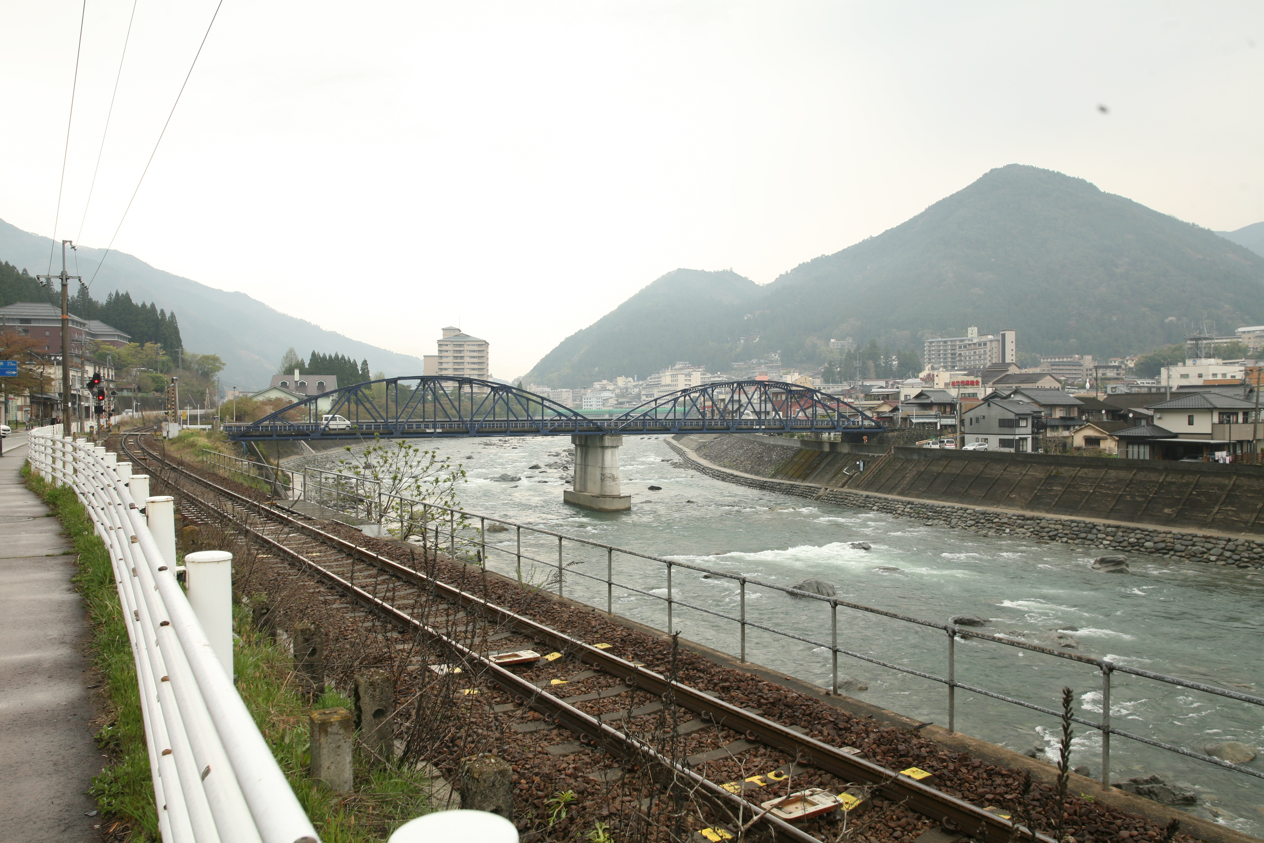 六ツ見橋（六見橋）。岐阜県下呂市にあるボーストリングトラス。